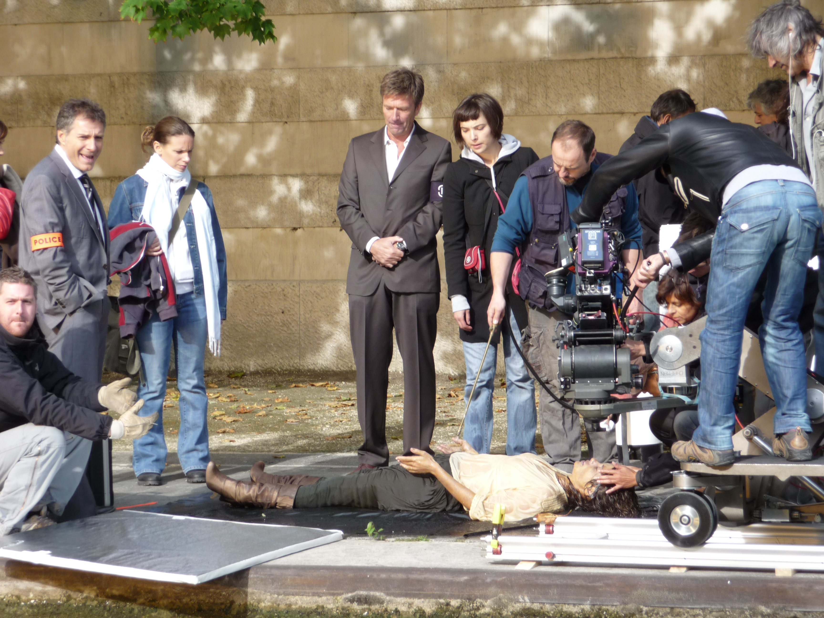 Le tournage de R.I.S. Police Scientifique - épisode 39, d'Alain Choquart, à l'écluse Villette dans le 19ème arrondissement de Paris le 17 septembre 2008.